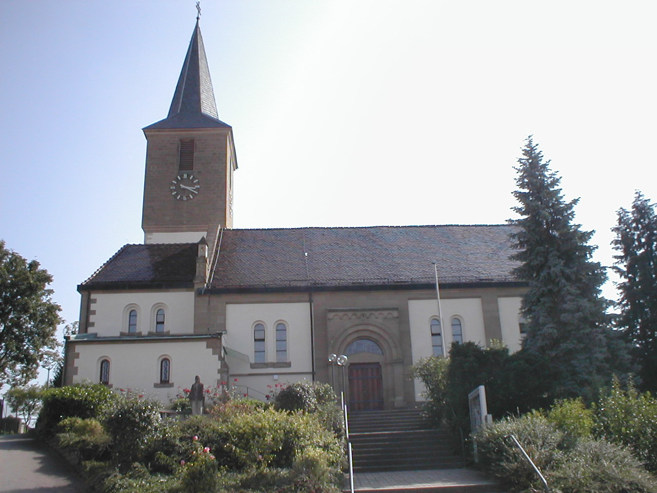 Pfarrkirche St. Walburga in Bachenau (Gundelsheim)